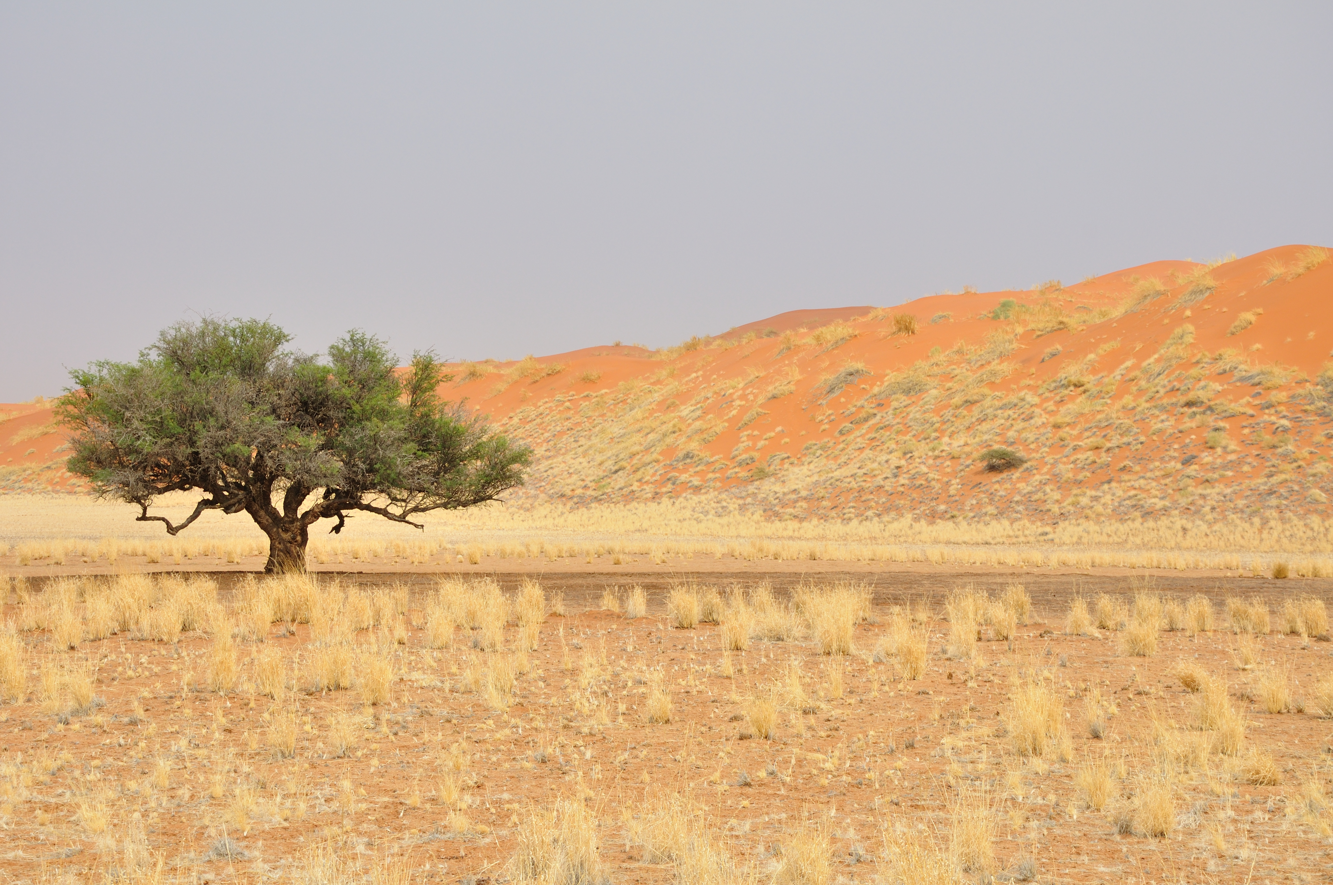 Namibia, Sossusvlei